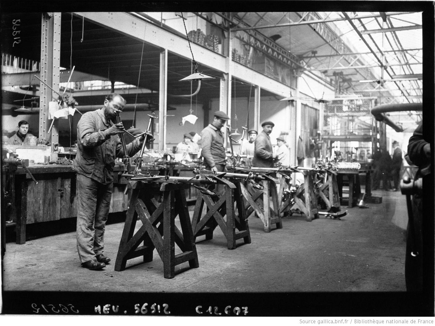 Fabrication des mitrailleuses à l'usine Darracq à Suresnes